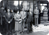 Otwarcie szkoly